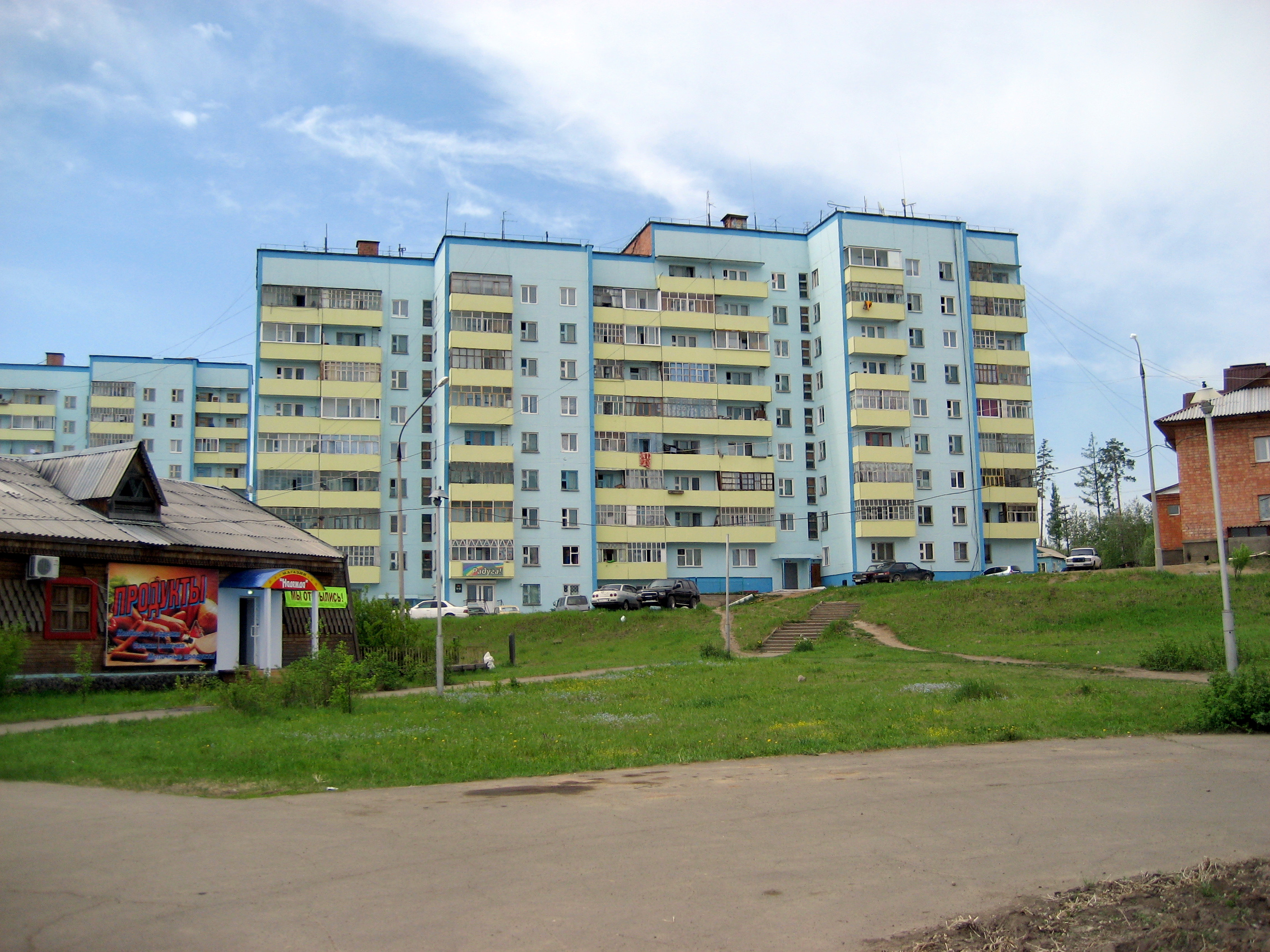 Город Кодинск, улица Гайнулина, дом 4. Один из трех девятиэтажных панельных двухподъездных домов жилого комплекса "3 тополя". Справа здание Администрации. Слева кафе "Берендей"